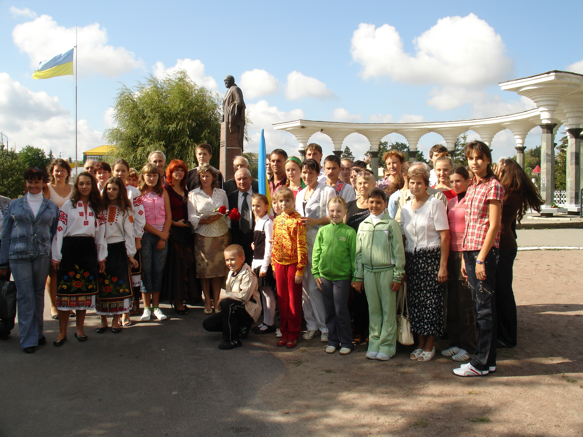 Тарасів дороговказ (2008) - Хмільник